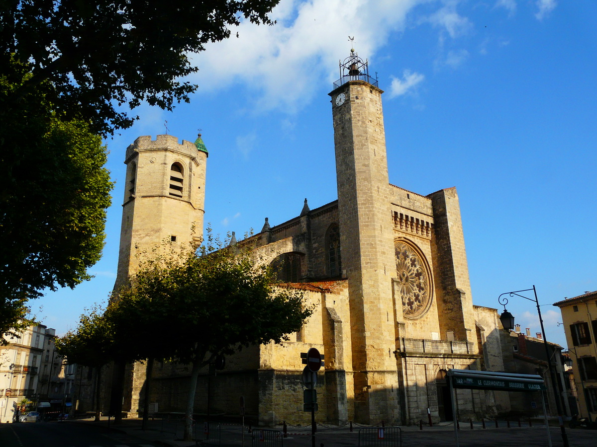 Collégiale de Saint-Paul, Clermont-l'Hérault, France